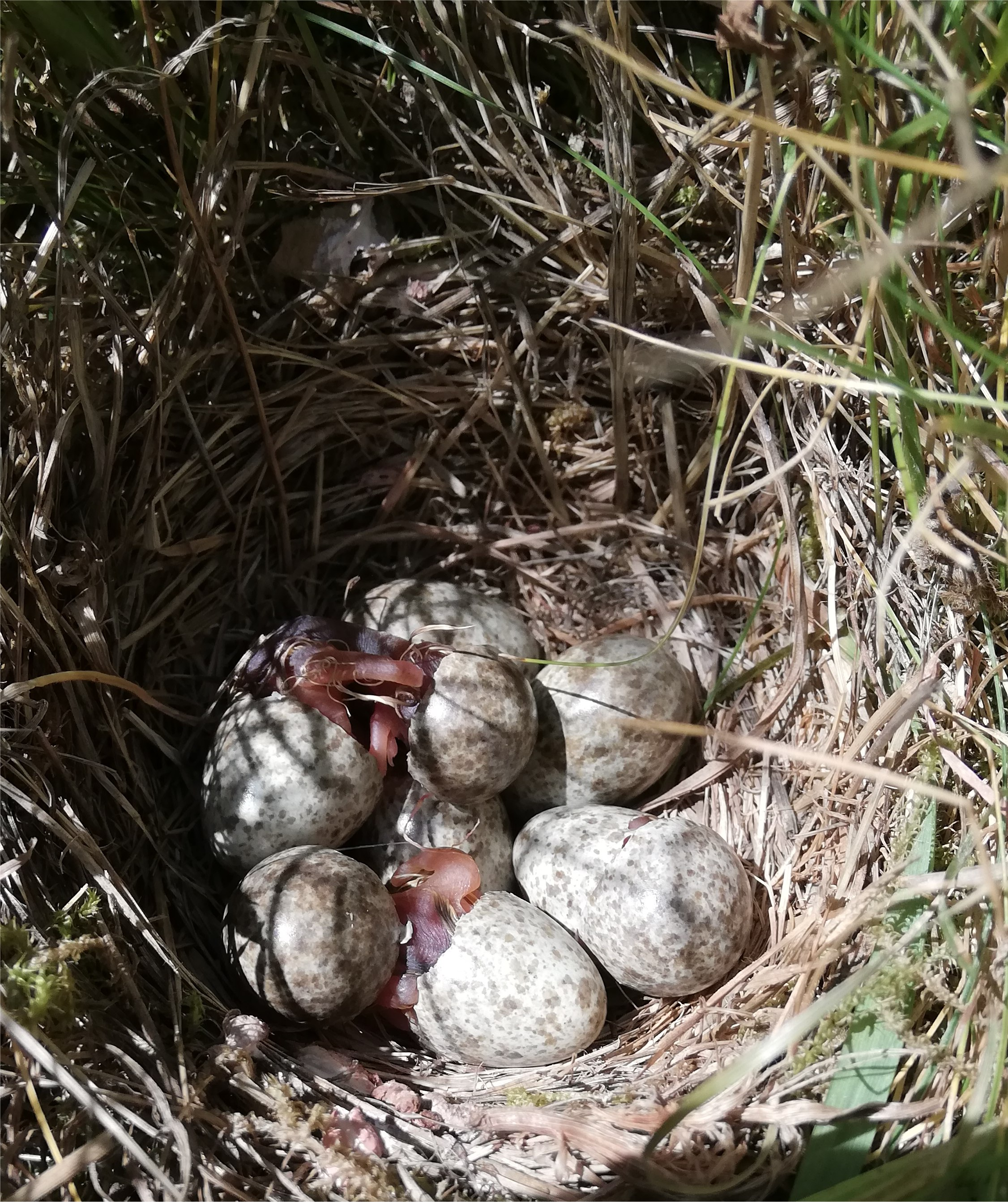 Schlüpfende Feldlerchen